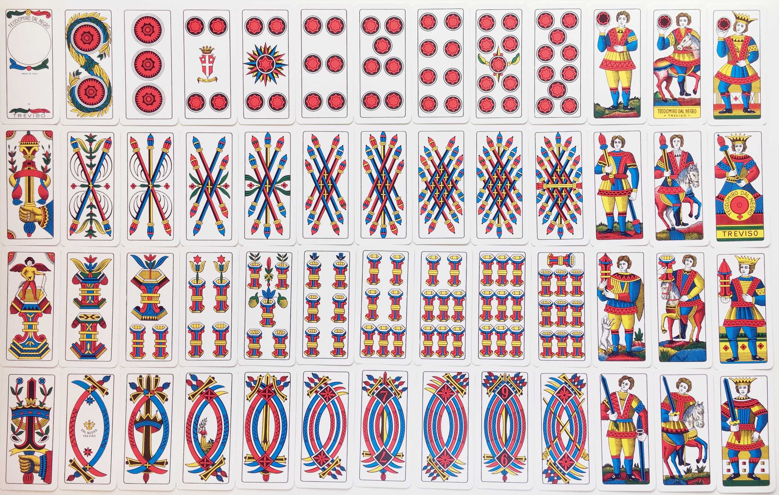 Carte bresciane al completo